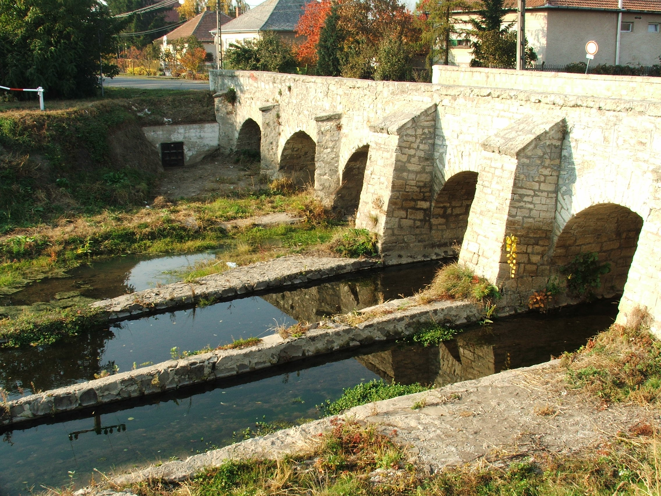 kőhíd This is a photo of a monument in Hungary, Identifier: 3294